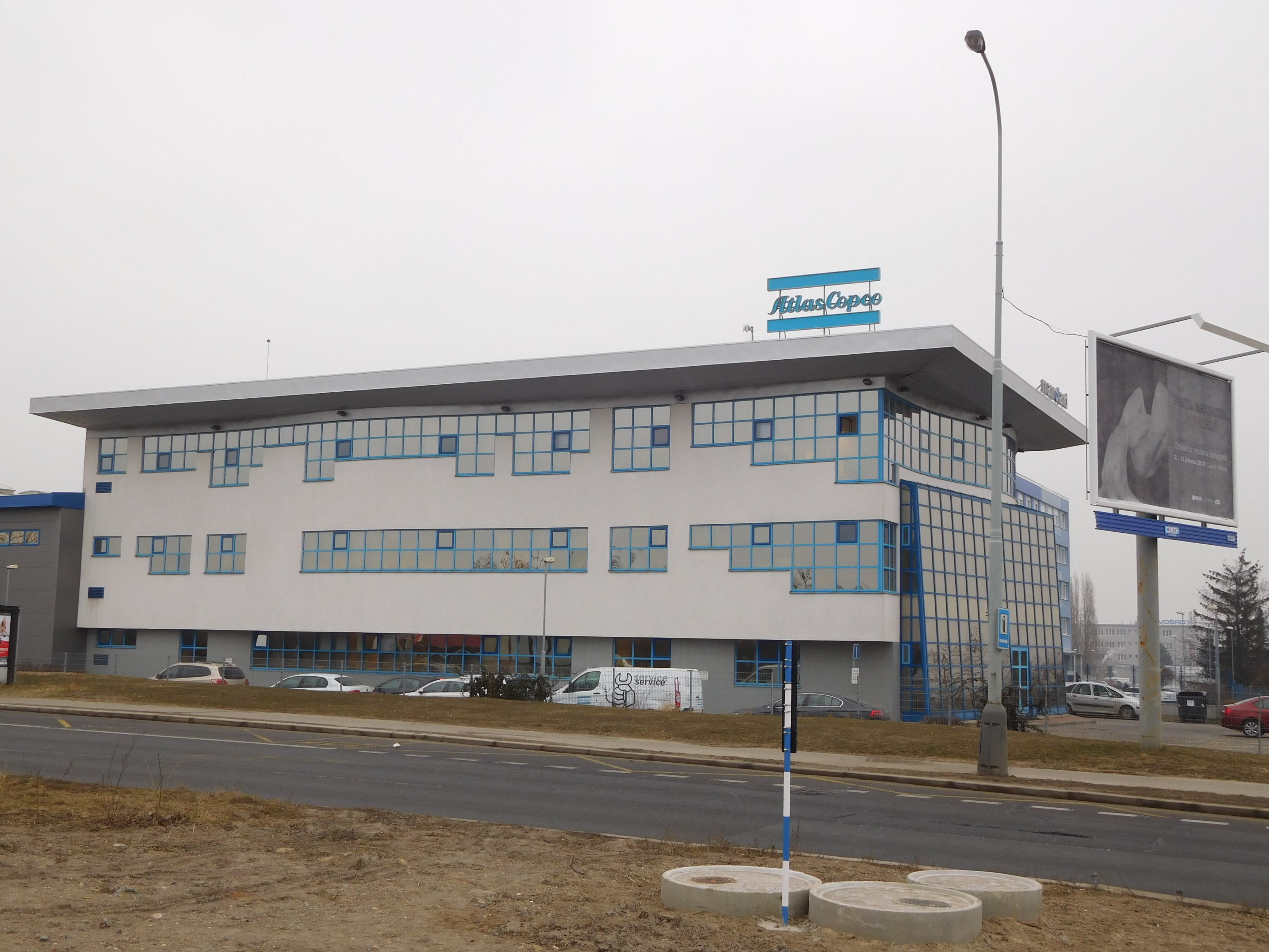 Praha - Hostivař, Průmyslová 10 - Atlas Copco